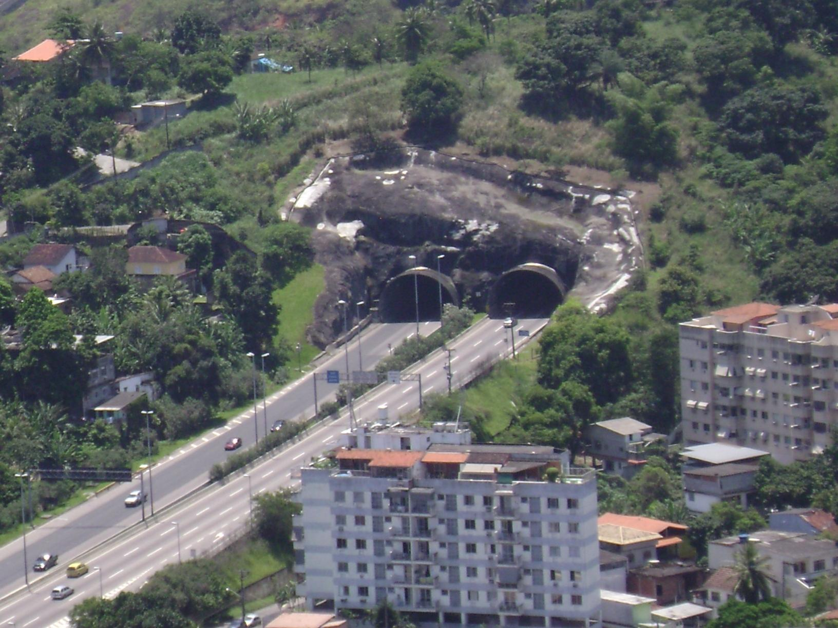 Túnel Feólogo Enzo Totis, na Linha Amarela, Rio de Janeiro.